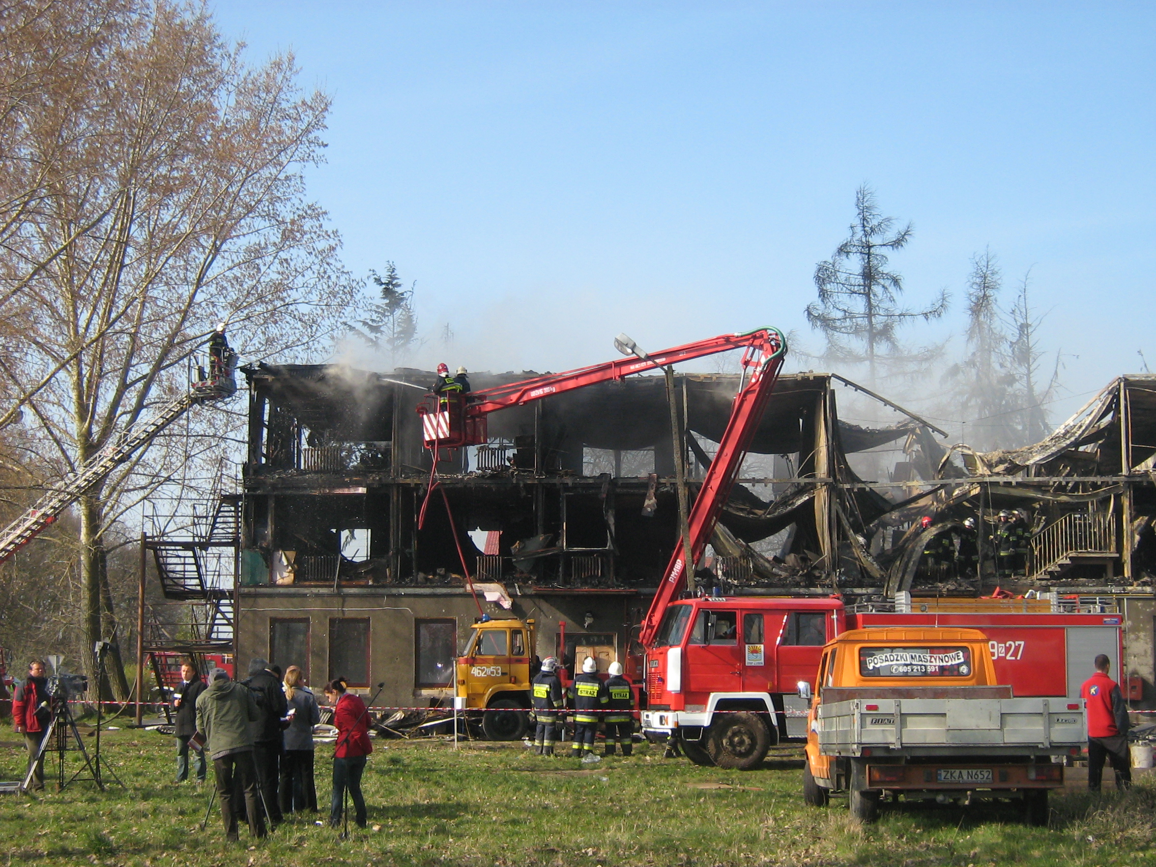 Pożar hotelu socjalnego w Kamieniu Pomorskim